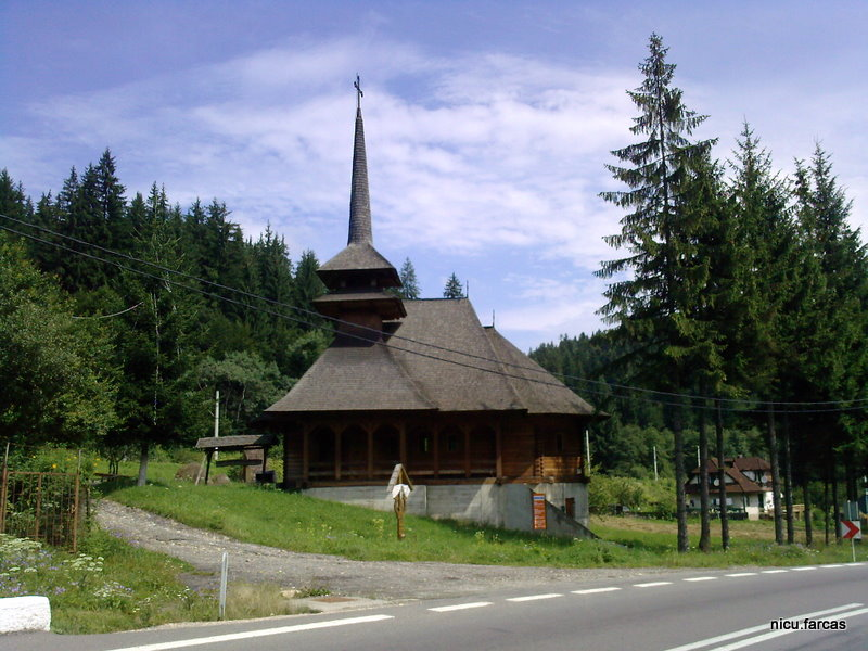 Biserica Ortodoxă Timișu de Sus, Predeal.